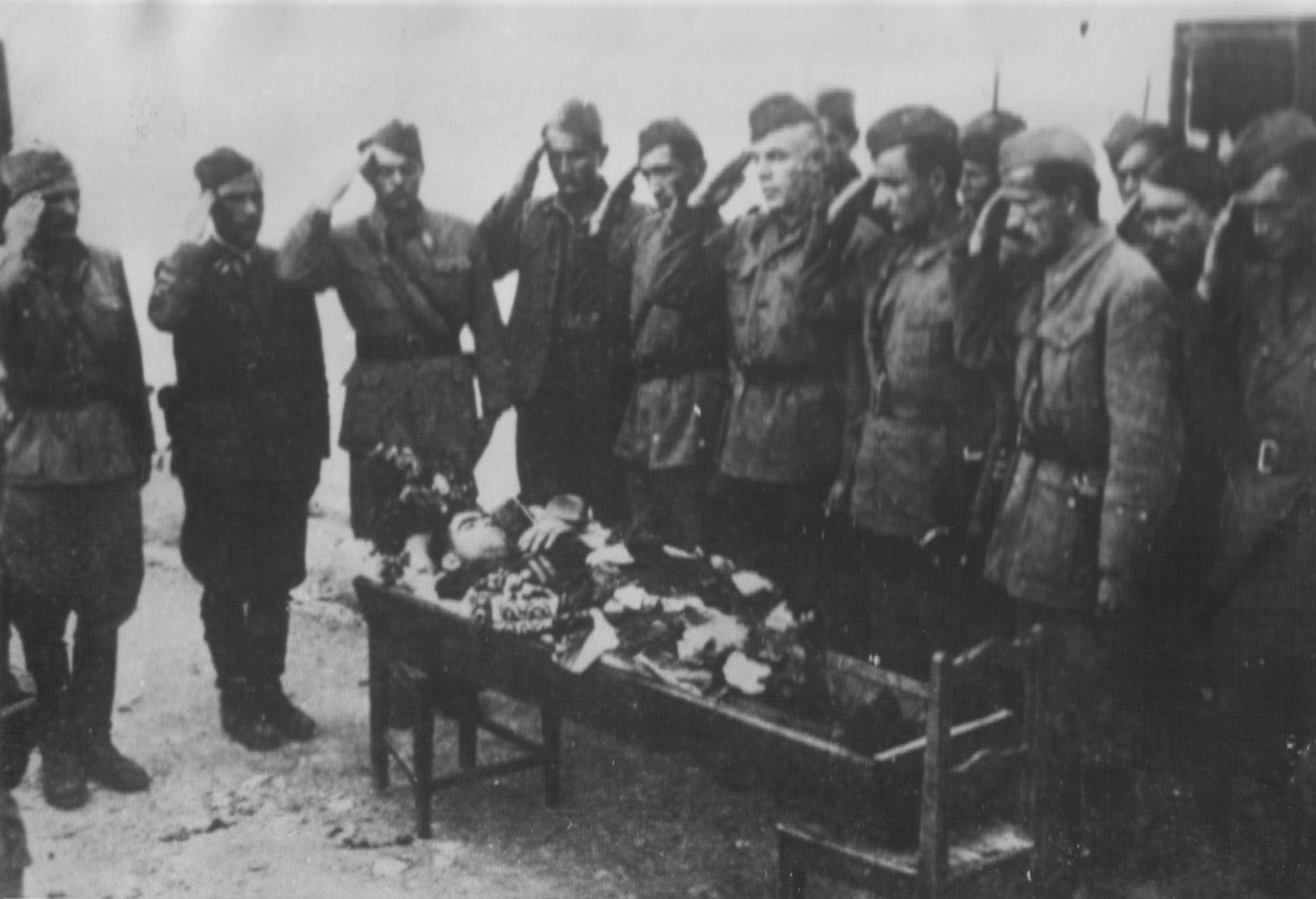 Srpskohrvatski / српскохрватски: Poslednji pozdrav palom komandantu 12. slavonske brigade Nikoli Demonji.